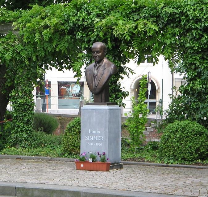 Buste de Louis Zimmer à la tour Zimmer